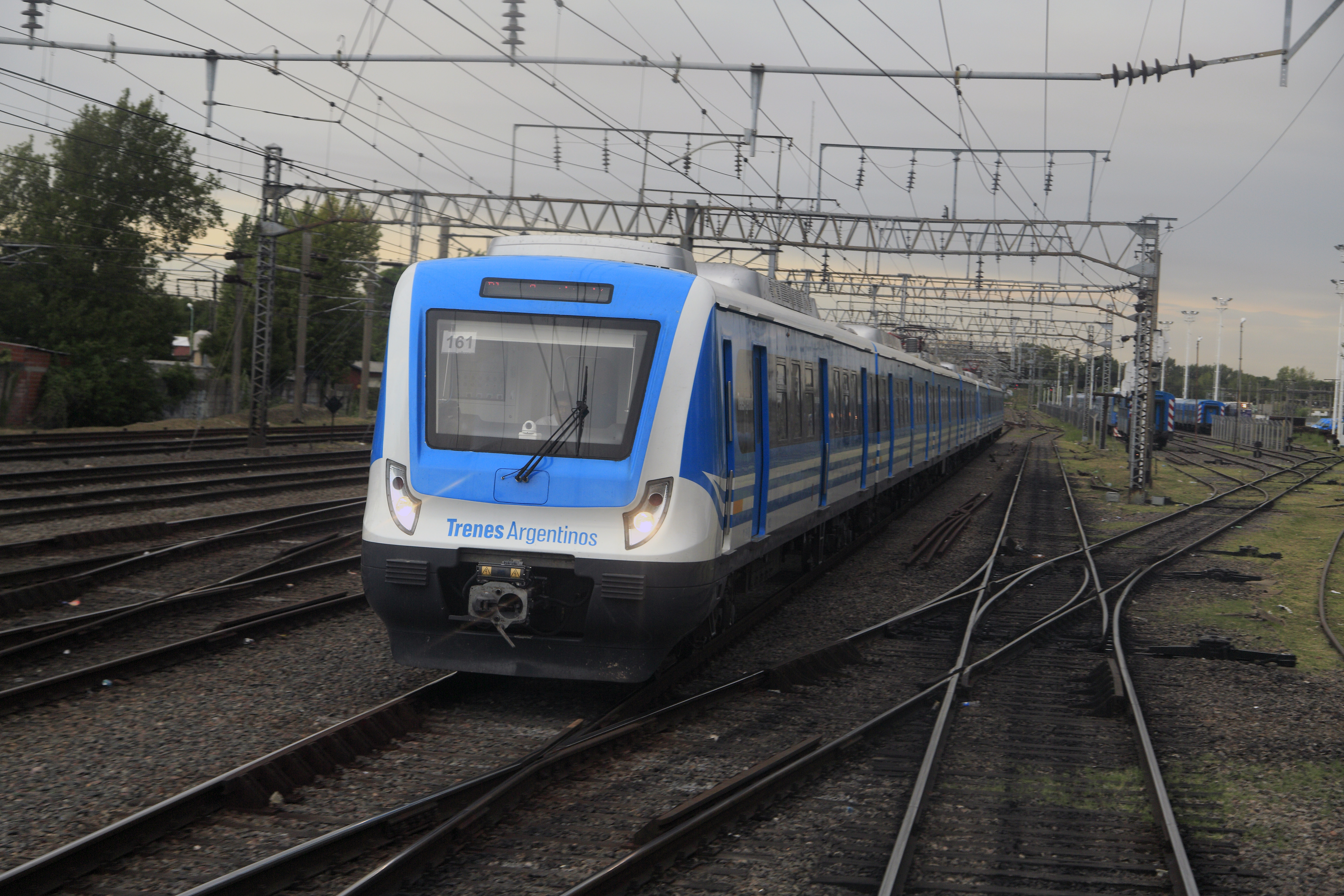 Ezeiza–Plaza Constitución, der eingestellte Fahrweg rechts ist der der eigenen Fahrt von Haedo.